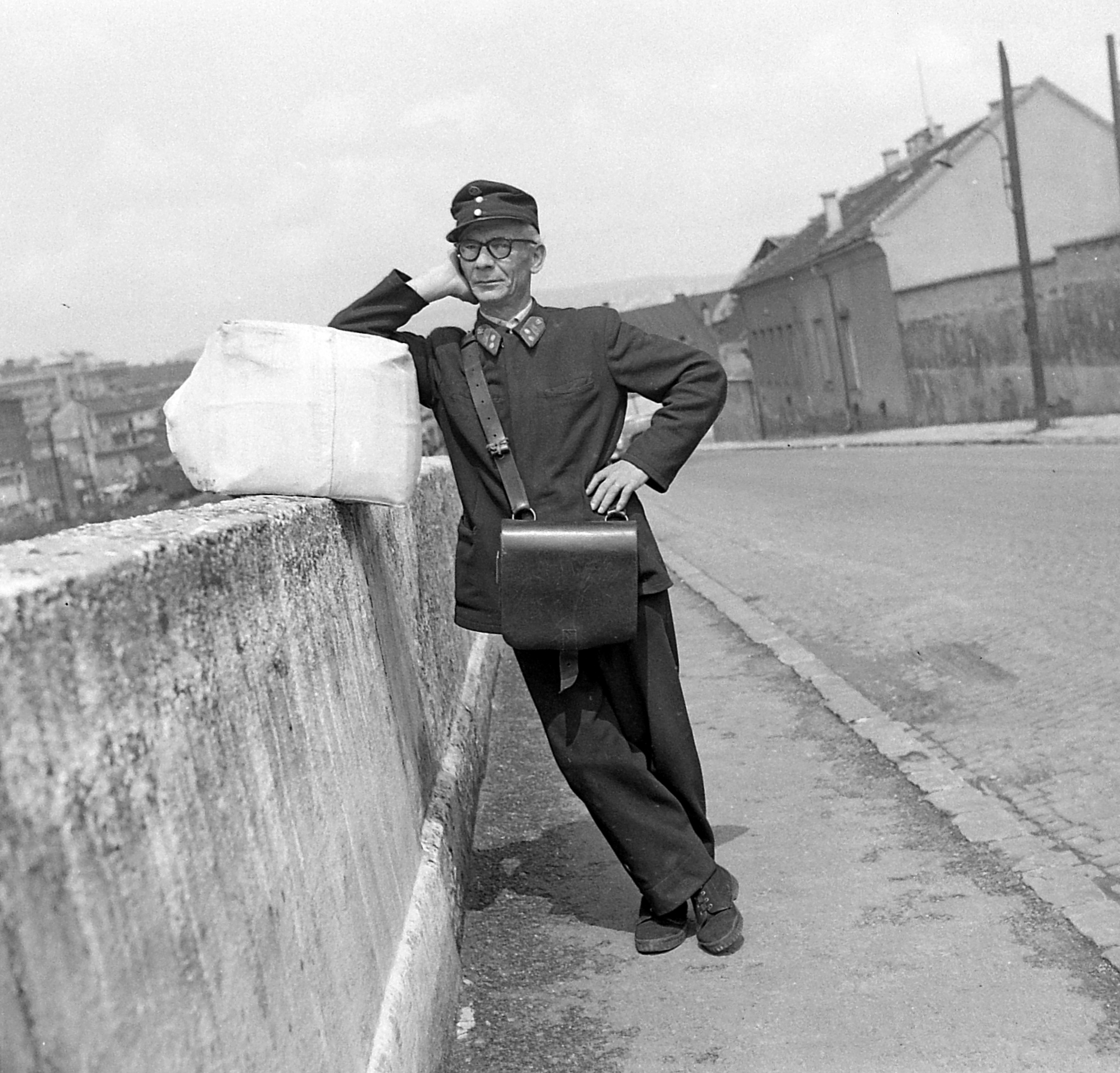 Győző utca a Kuny Domokos utca felé nézve. Location: Hungary, Budapest I. Tags: portrait, postman, street view, Budapest Title: Győző utca a Kuny Domokos utca felé nézve.